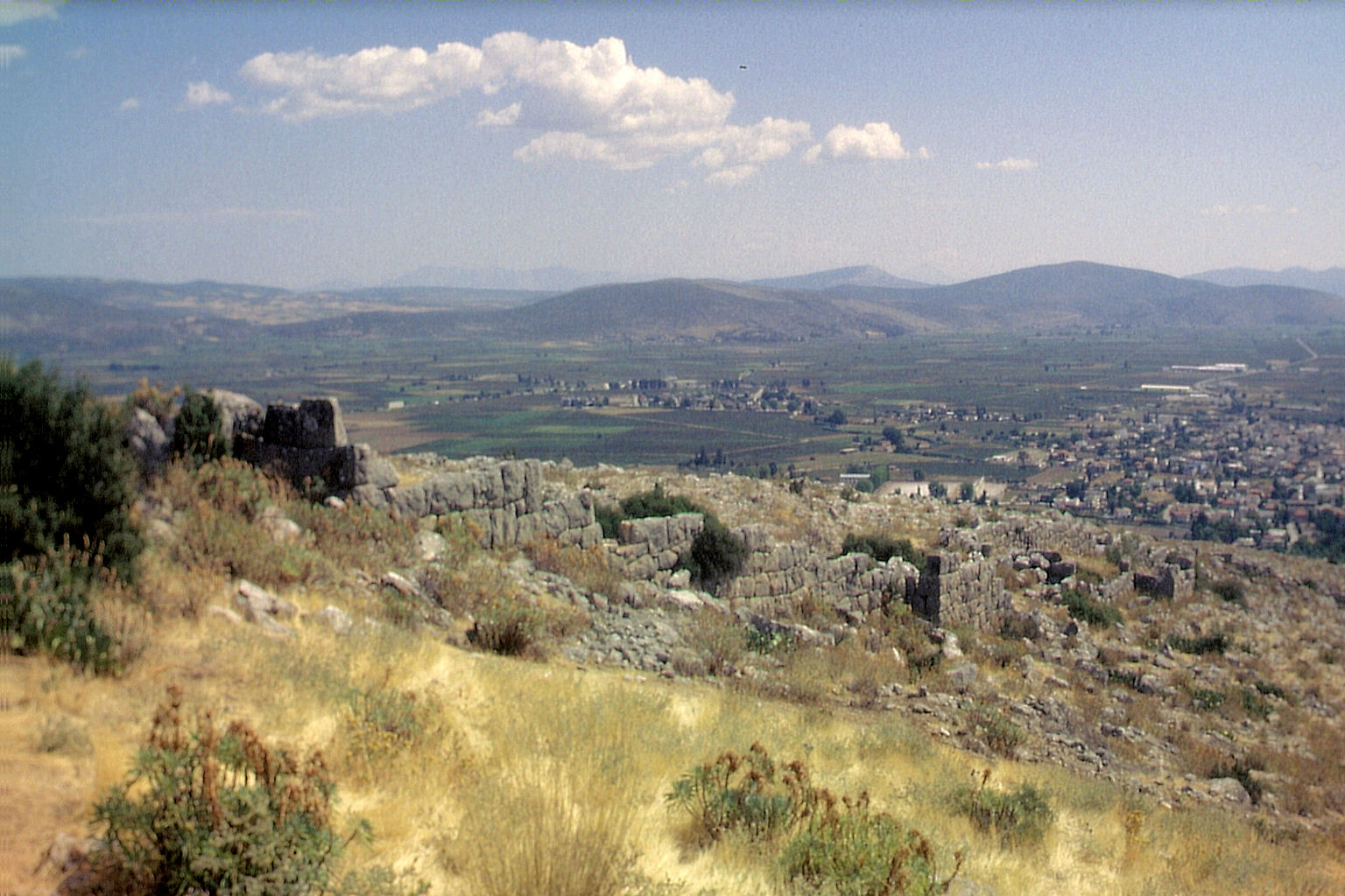 Südmauer der Unterburg aus Südwest